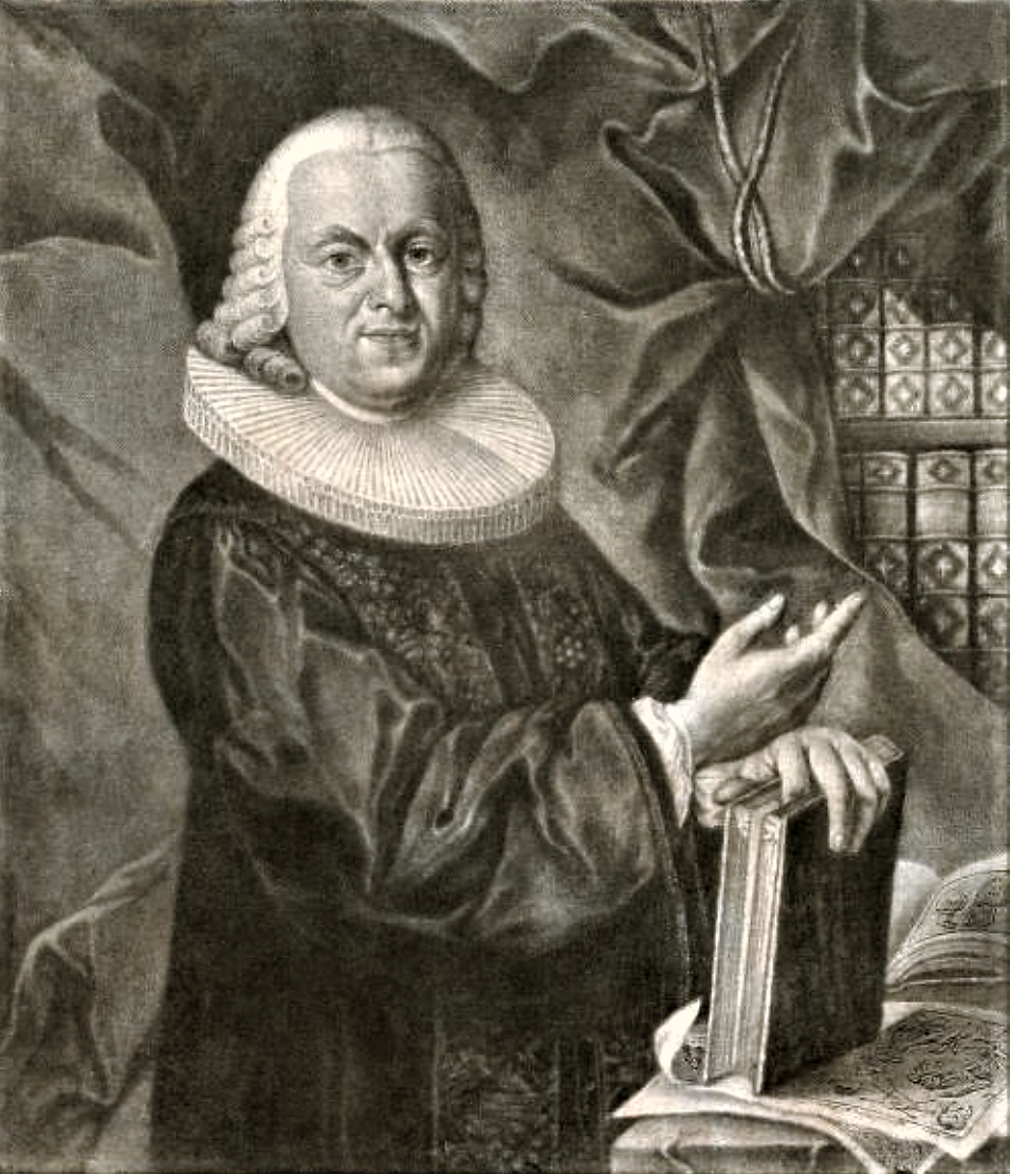 Jacob Christian Schäffer (1718- 1790), vor 1774